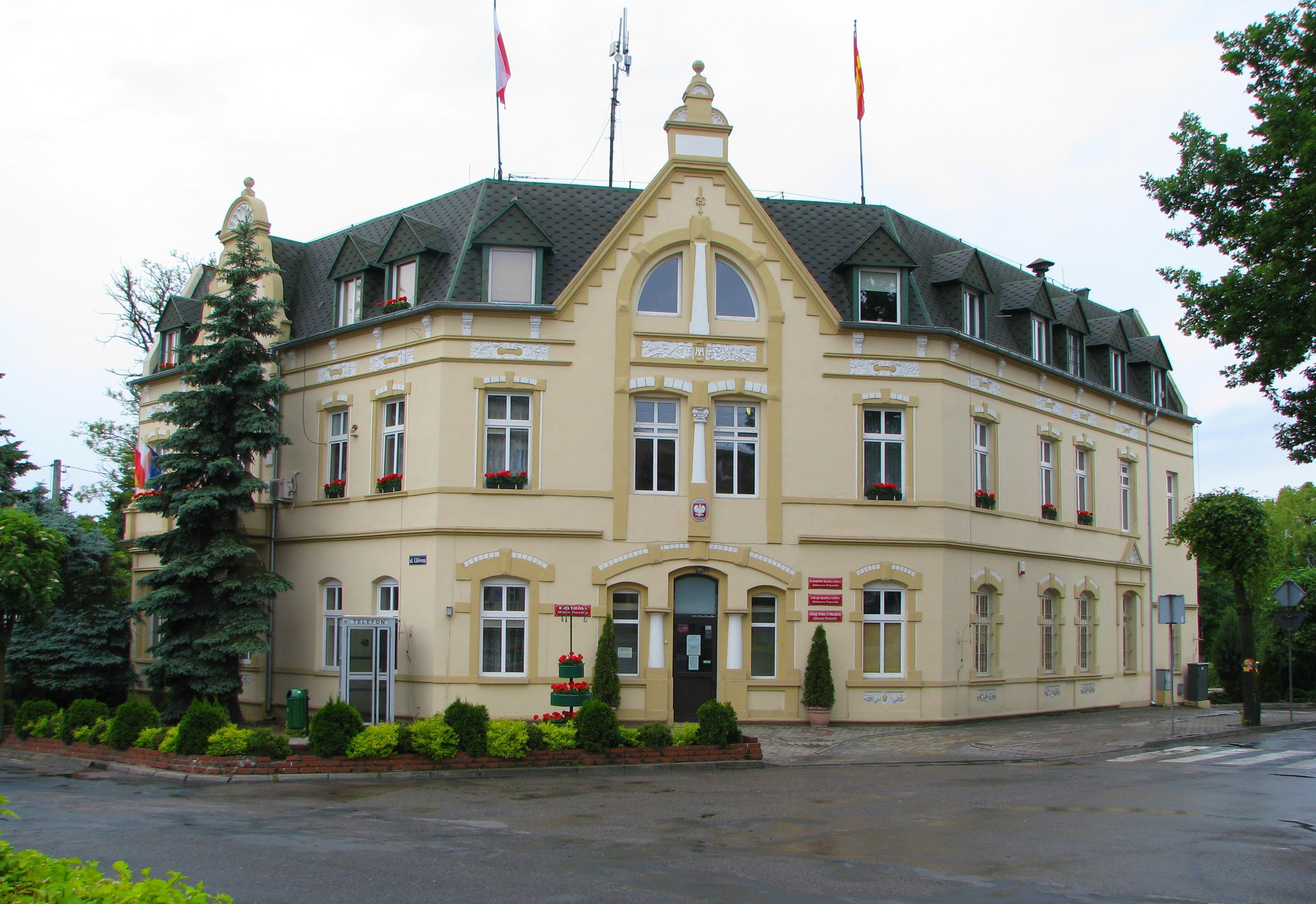 Urząd Miasta i Gminy